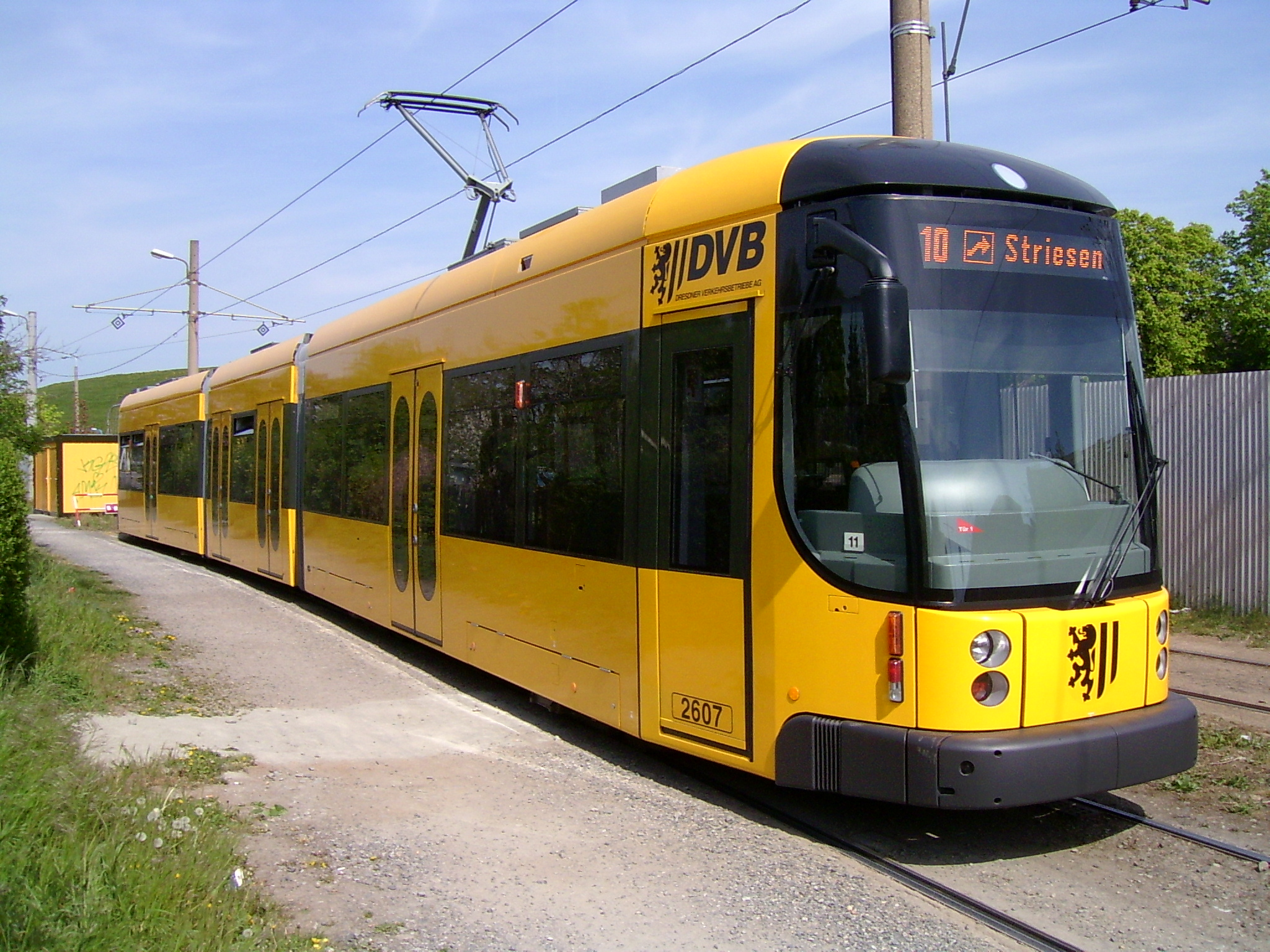 Niederflurgelenktriebwagen NGT D8DD der Dresdner Verkehrsbetriebe (Tw 2607) Linie 10 nach Striesen, im Gleisdreieck an der Endstelle Friedrichstadt